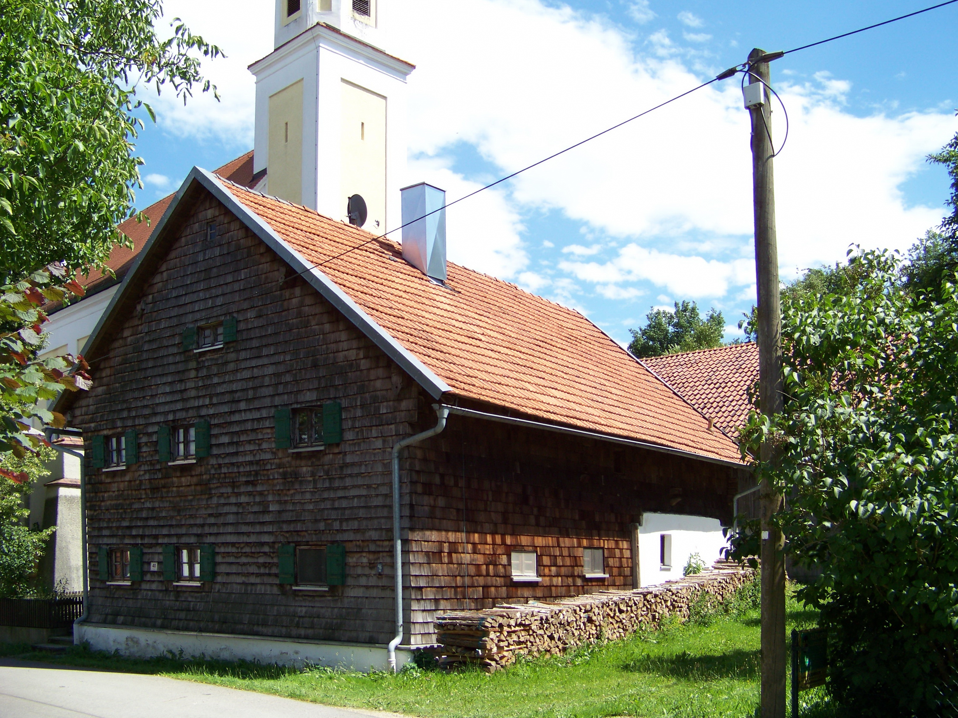 Schierling. Wahlsdorf 40. Bauernhaus, zweigeschossiger, giebelständiger und verschindelter Blockbau mit Satteldach und massivem Stallteil, 18. Jahrhundert.